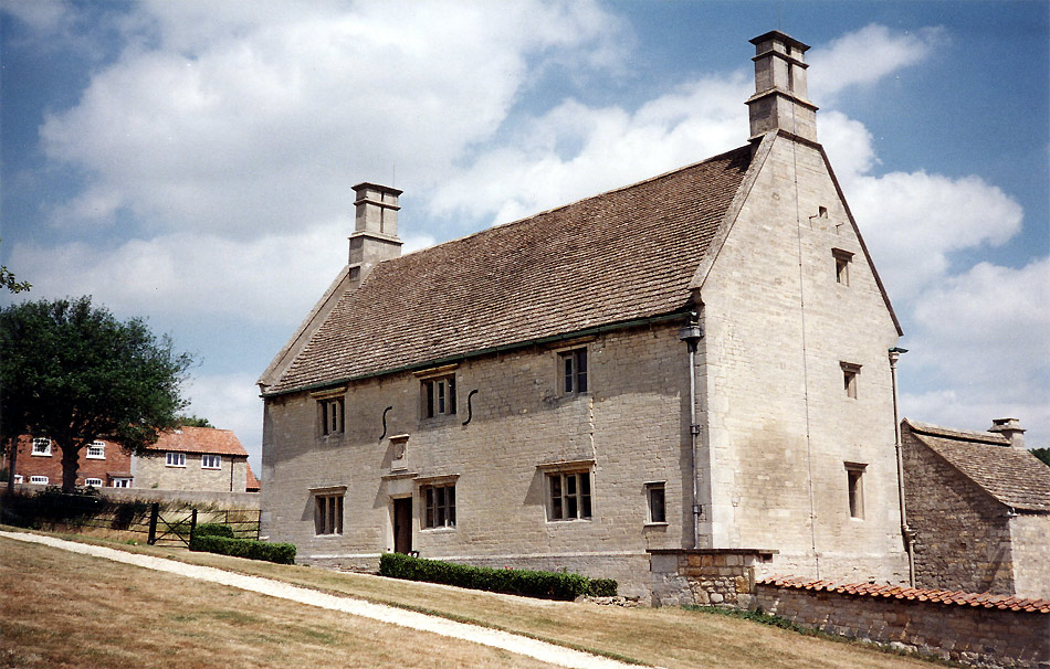 Casa natale di Isaac Newton